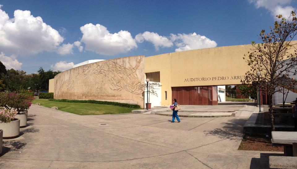 En el auditorio Arrupe se hacen conferencias de todo tipo asi como academicas.